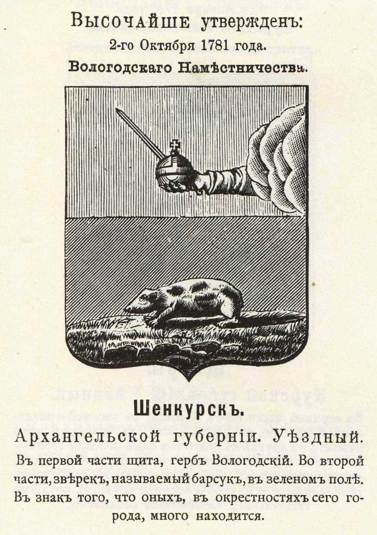 Official Russian Empire coats of arms. Герб города Российской Империи Шенкурск с официальным описанием в Гербовнике Винклера.